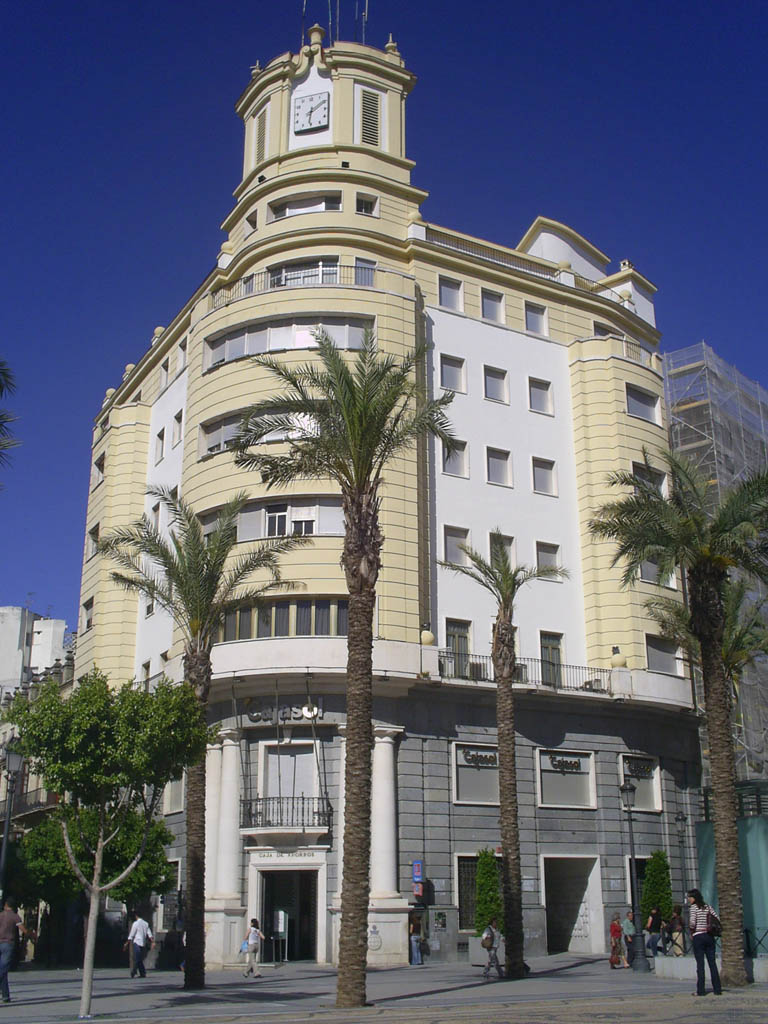 Oficina Central de Cajasol en Jerez; Central Office of Cajasol in Jerez